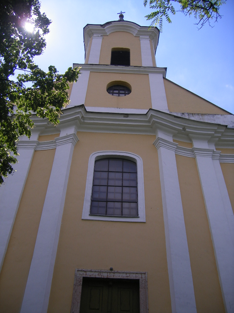 Nagybörzsöny - Szent Miklós templom This is a photo of a monument in Hungary. Identifier: 7145